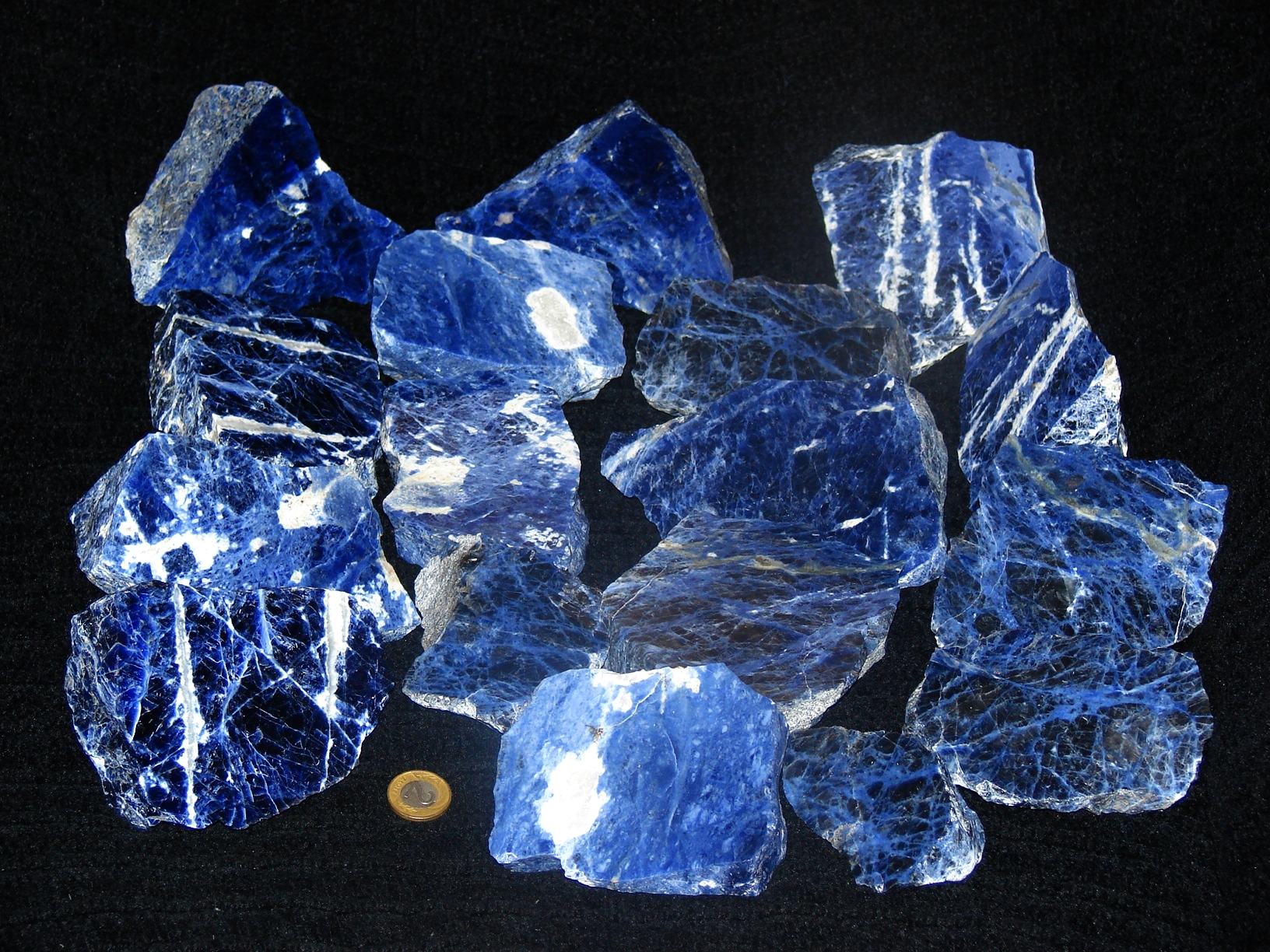 Sodalit, polerowane zgłady z Brazylii